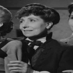 Amalia Bernabé en una de sus películas.